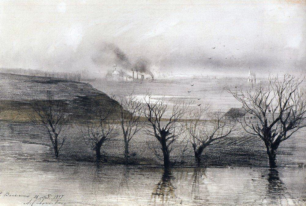 Саврасов Алексей Кондратьевич (1830 - 1897). Пейзаж. Село Волынское. 1887